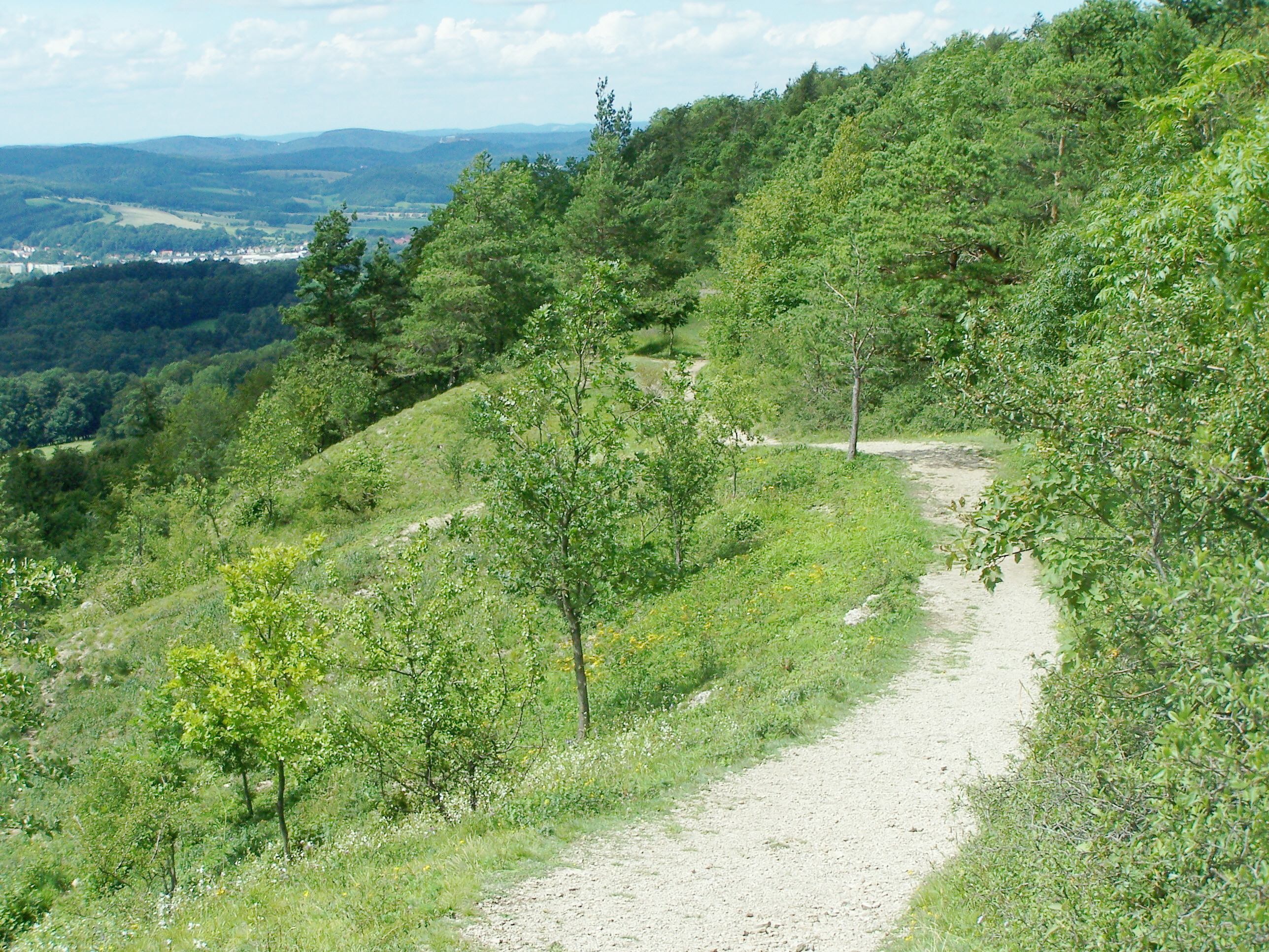 Der Kammweg am Hörselberghaus, im Hintergrund die Berglandschaft um Eisenach mit der Wartburg.